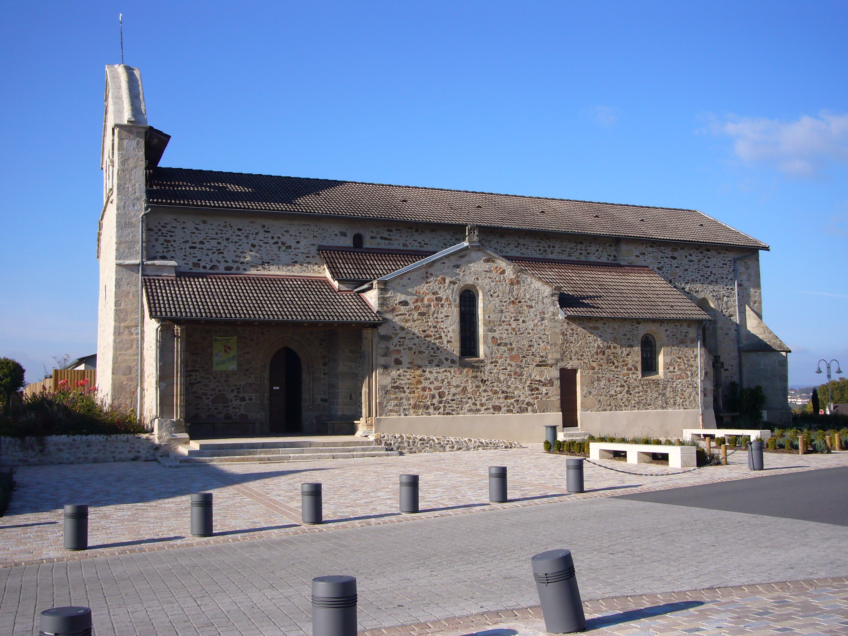 Eglise de Panazol (87, France)